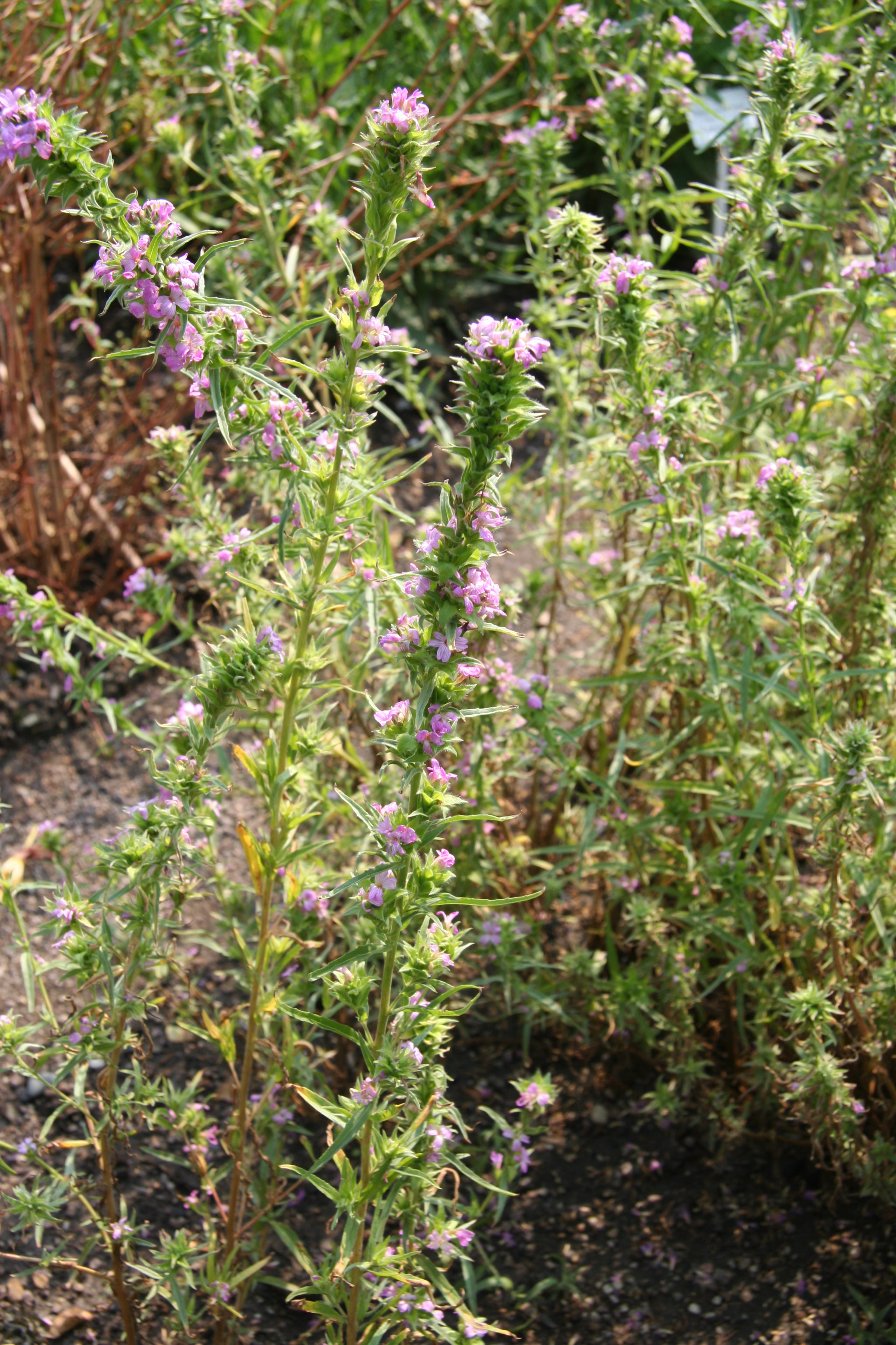 Boisduvalia densiflora im Botanischen Garten Dresden